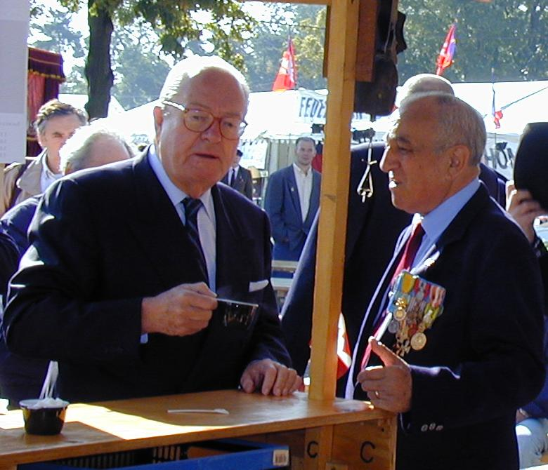 Jean-Marie Le Pen et Roger Holeindre aux BBR en septembre 2001